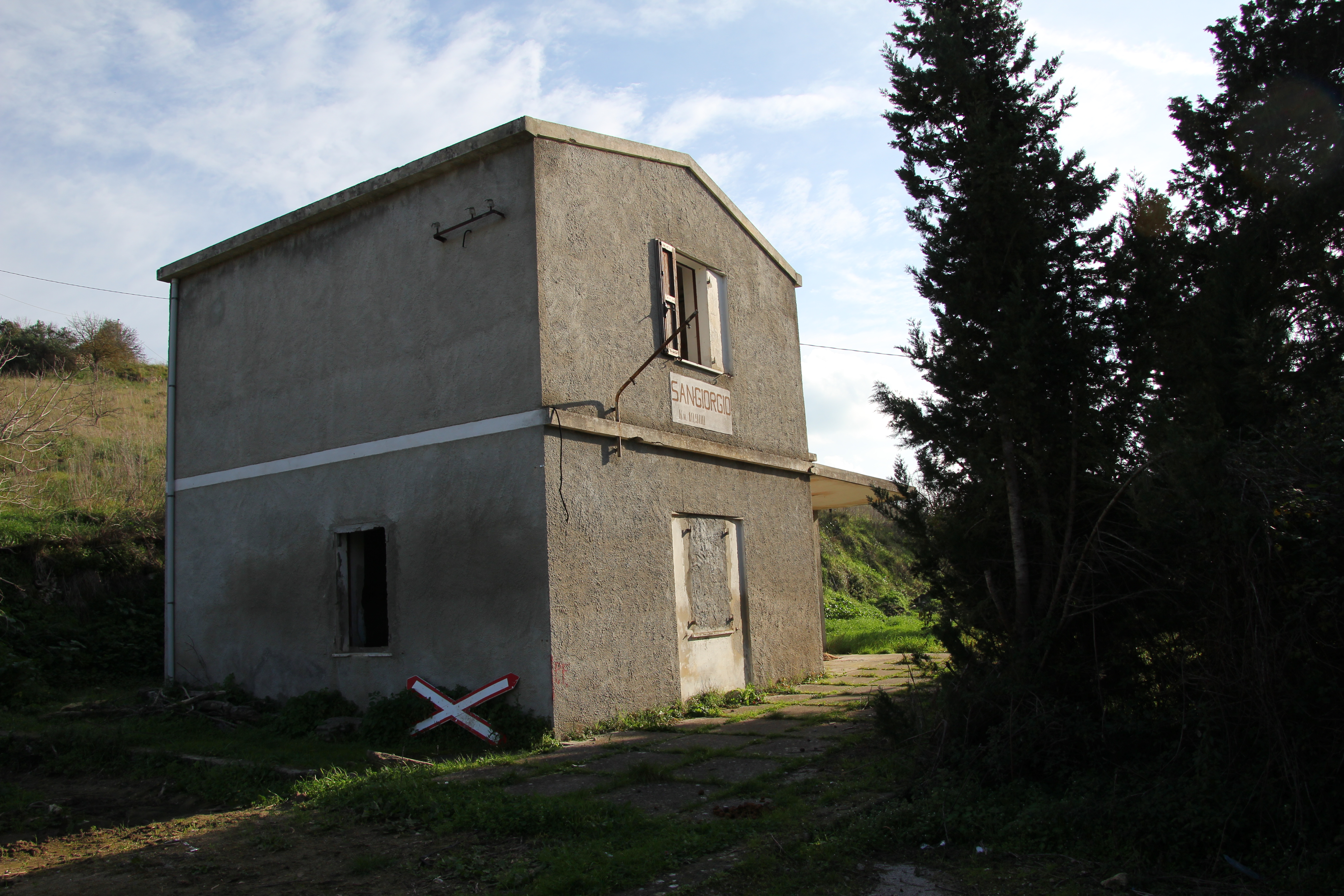 Usini - Ex stazione ferroviaria di San Giorgio